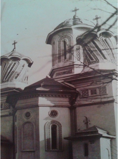 VSergo4